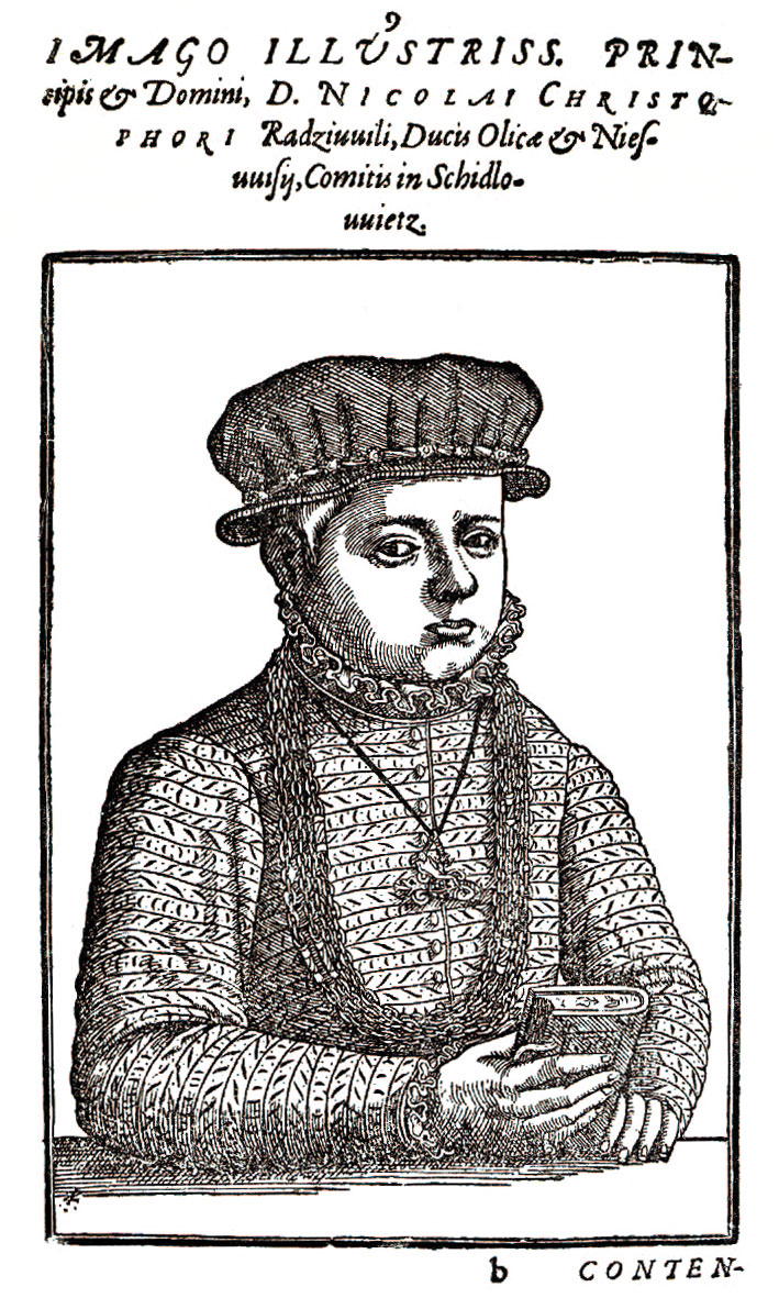 Беларуская (тарашкевіца): Мікалай Радзівіл Сіротка